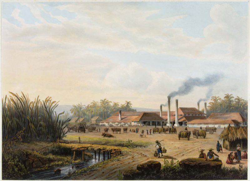 Litho. Litho naar een schilderij van A. Salm.. Een suikerfabriek